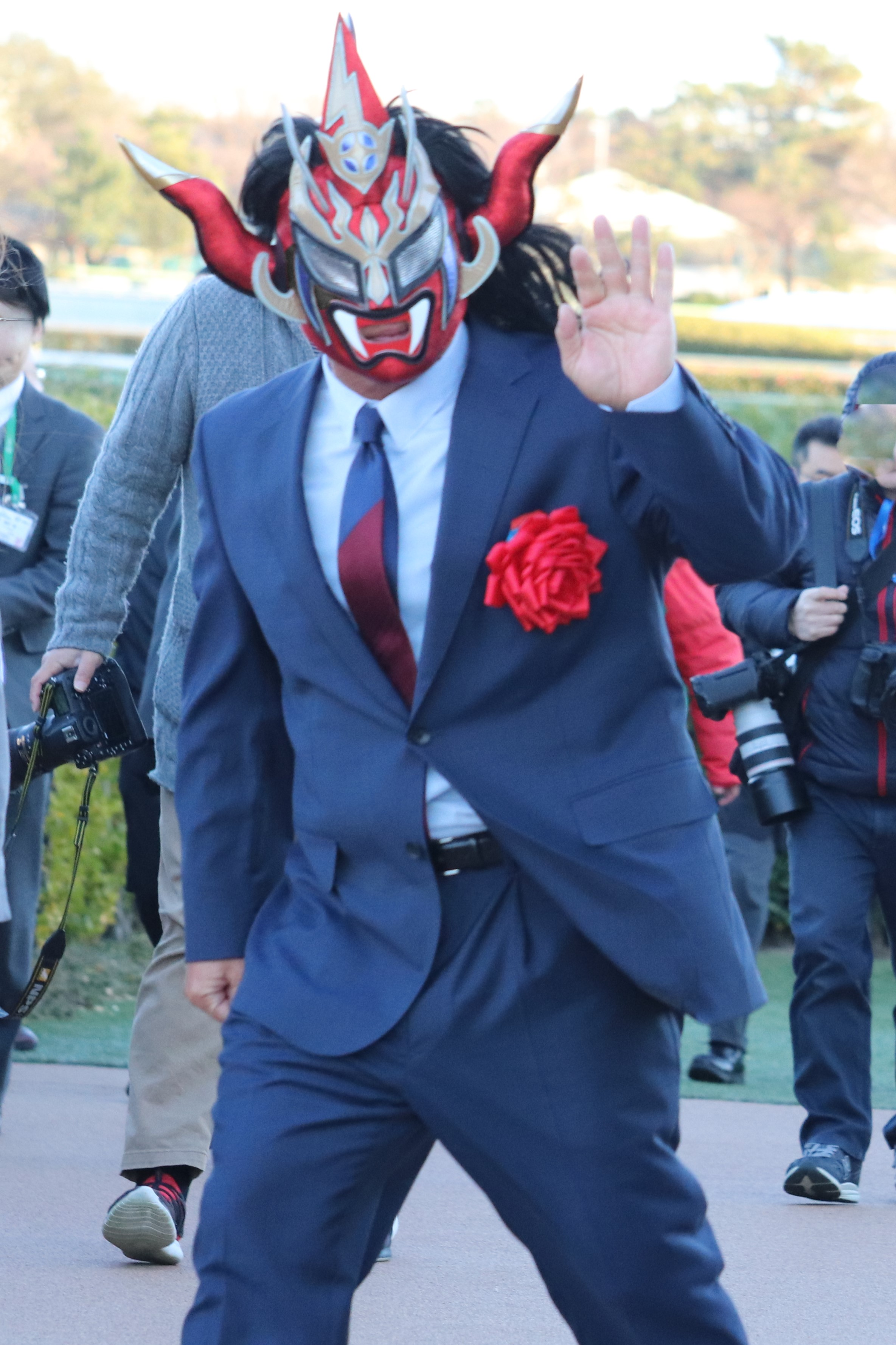 2019年12月28日 中山競馬場 スーツ姿の獣神サンダーライガー